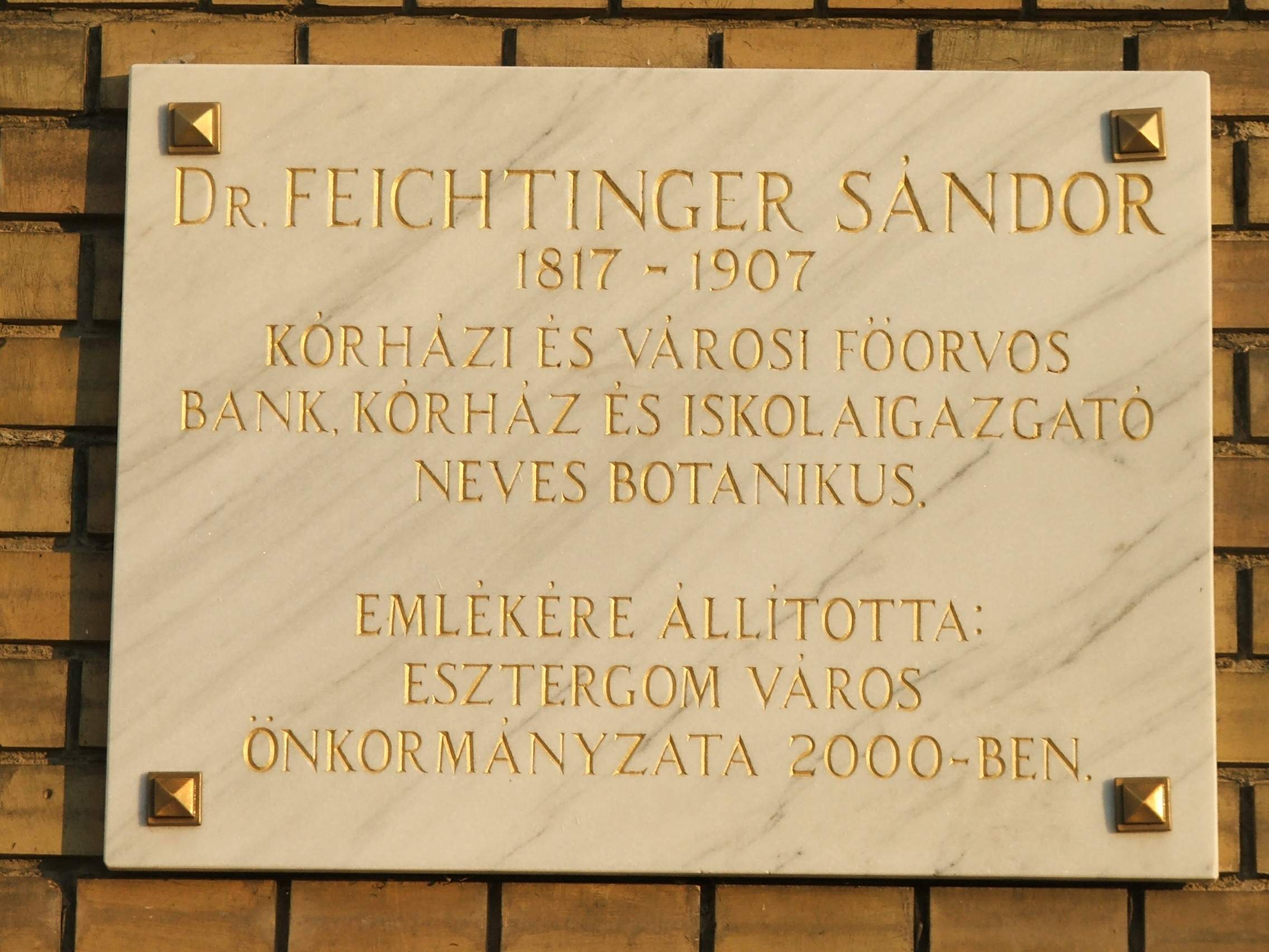 Szentgyörgymezei Olvasókör